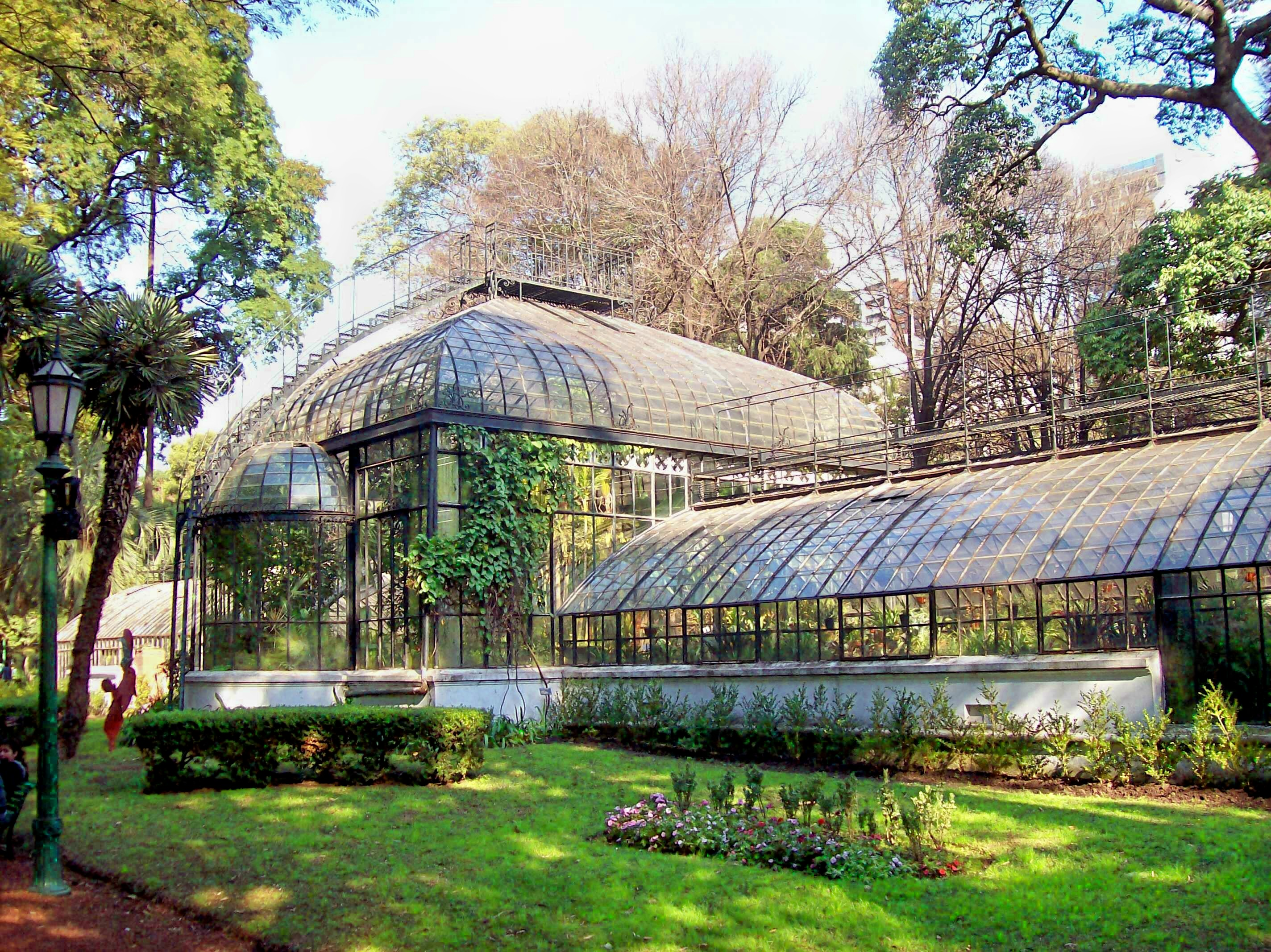 Invernadero del Jardín Botánico de Buenos Aires, Argentina. A 30 m de Av Santa Fe, a la altura de su intersección con Armenia. Tomada de NNO a SSE